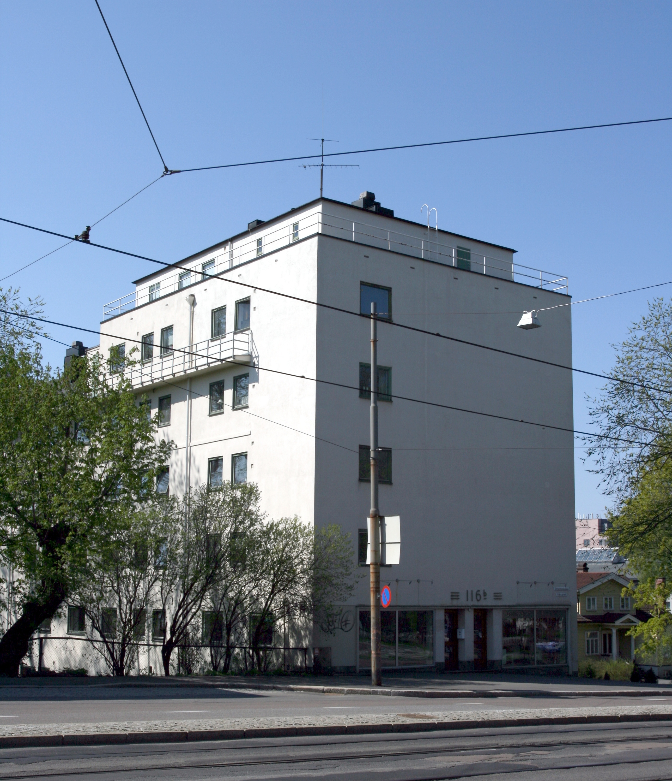 Drammensveien 116b i Oslo. Funkisgården ble oppført i 1936 etter tegninger av arkitekt Ragnar Nilsen, og fikk Sundts premie samme år.